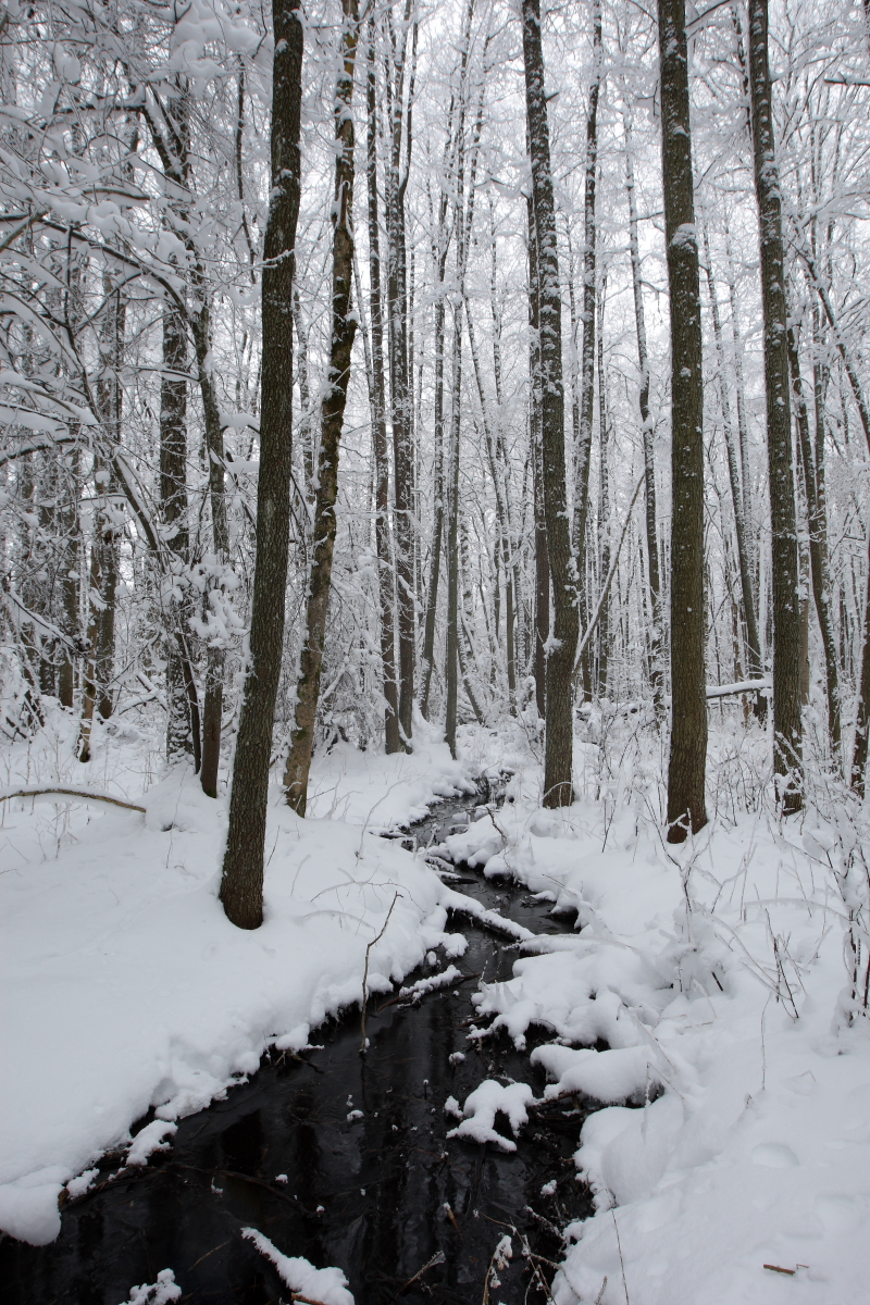 Talvine mets Matsalu lähistel